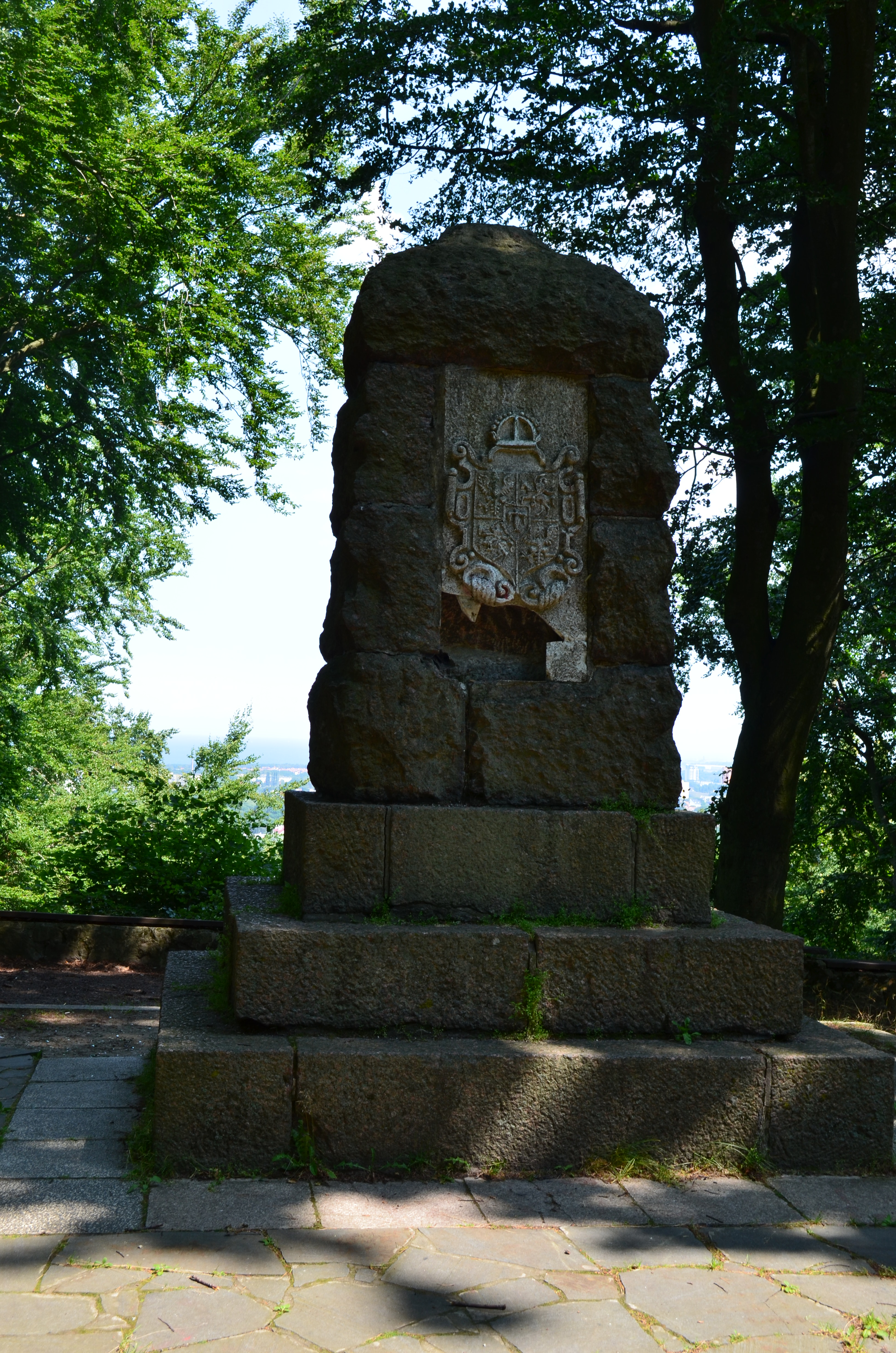 Pomnik Bitwy pod Oliwą ze Wzgórza Luizy w Oliwie (Gdańsk)